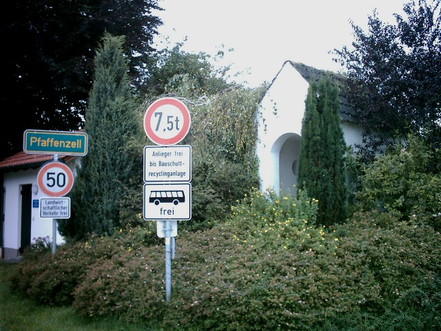 Wegkapelle vor Pfaffenzell (Gemeinde Affing) an der Straße nach Edenried